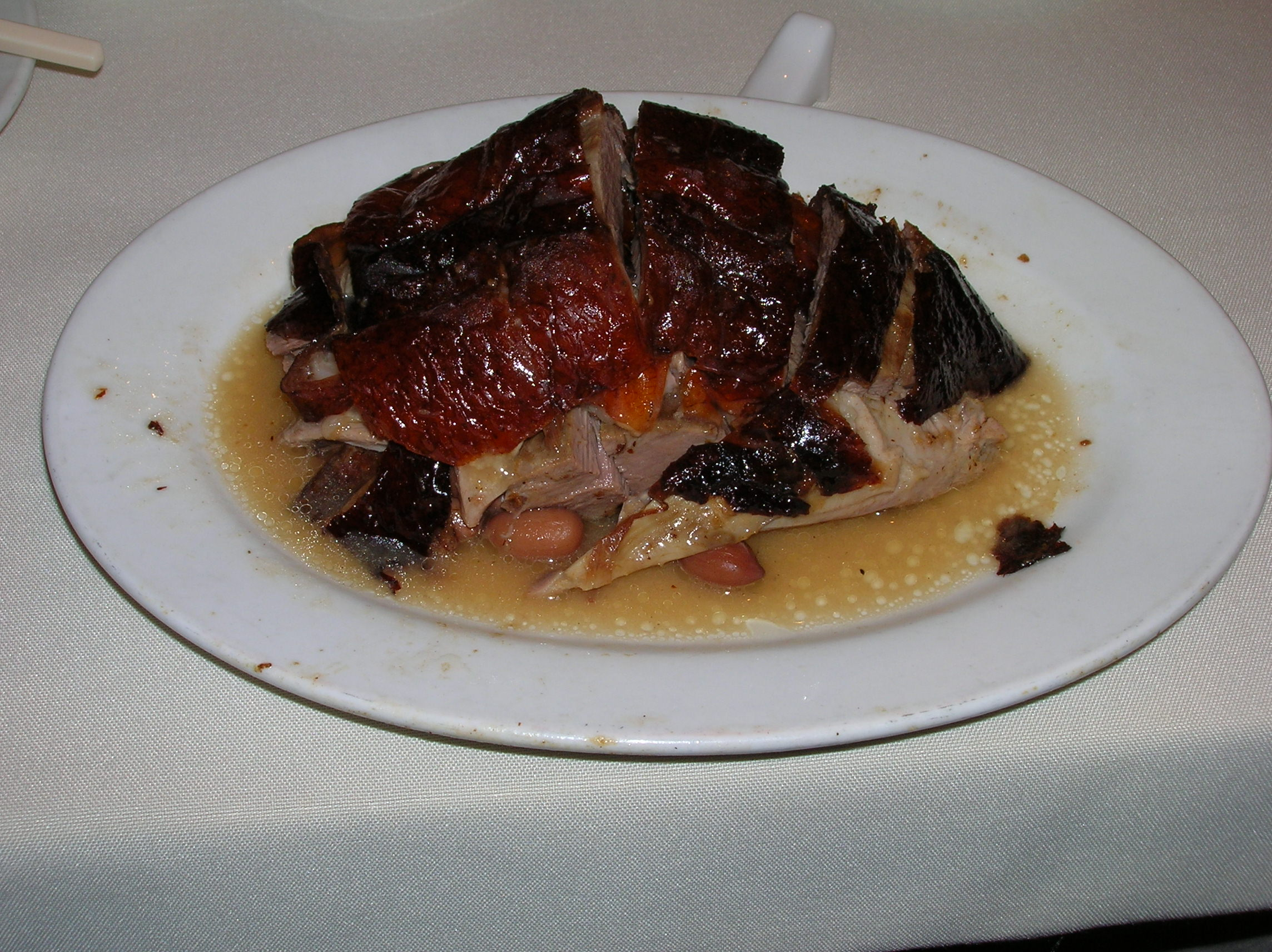 הברווז המפורסם של מסעדת יונג קי בהונג קונג